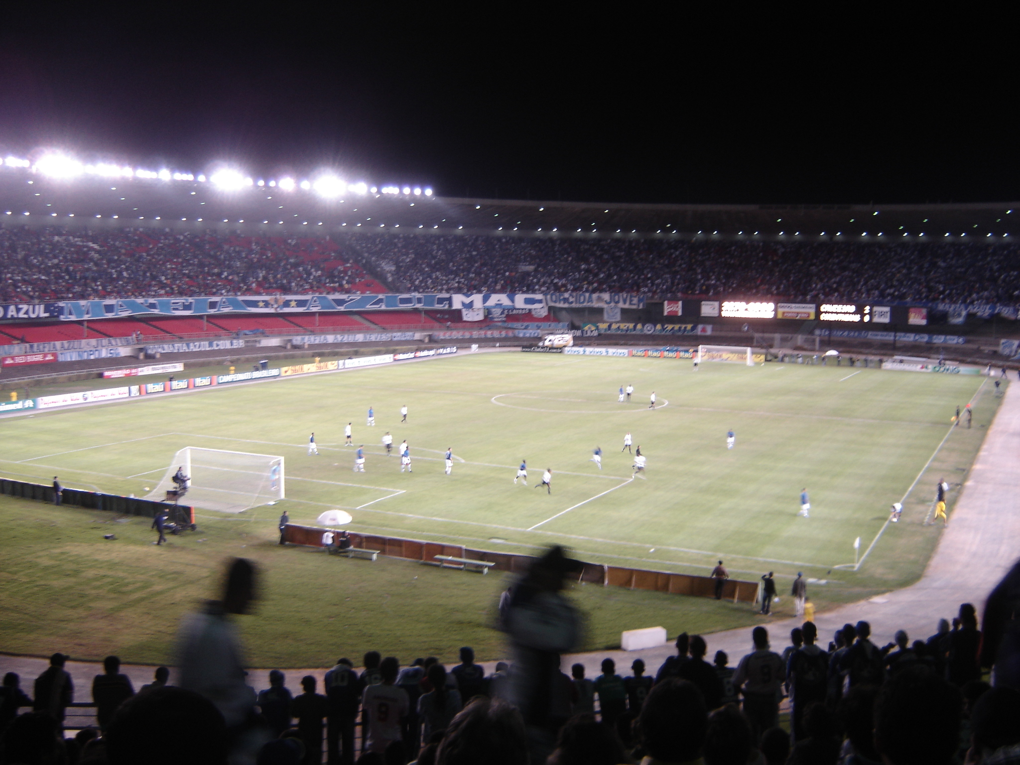 Match: Cruzeiro EC - SC Corinthians Paulista, Mineirão Stadium, July 12 2006, Brazilian Championship. Partida entre Cruzeiro EC e SC Corinthians Paulista, no Mineirão, em 12 de julho de 2006, pelo Campeonato Brasileiro.